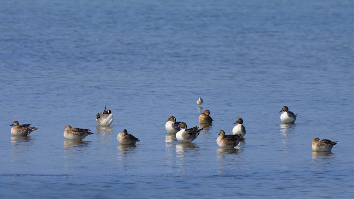 Mannar Lagoon, Sri Lanka.